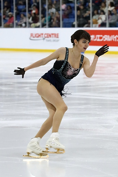 Евгения Медведева на Autumn Classic International 2018 - Короткая программа